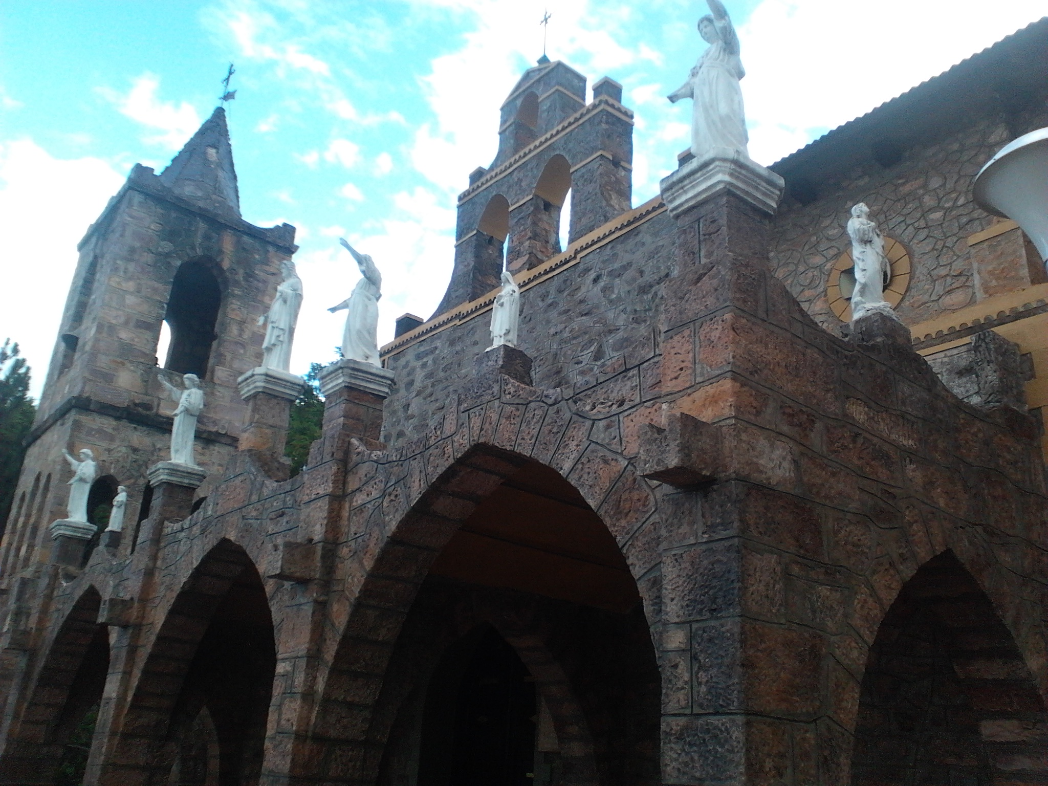 Iglesia de Santa Elena de Uairén.